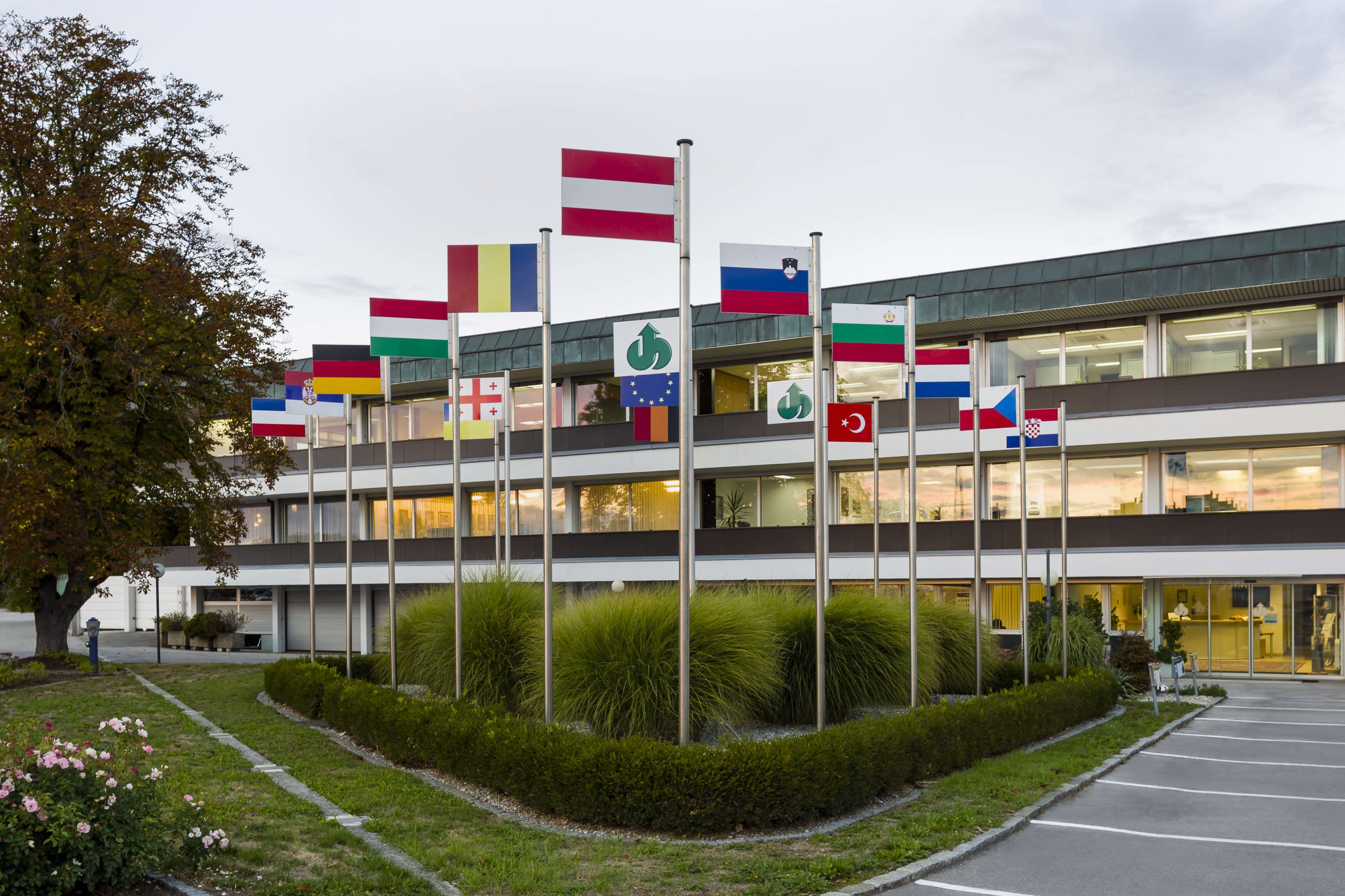 Unternehmenshauptsitz